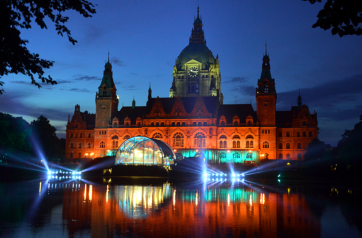 Blick vom Maschpark auf die illuminierte Opernbühne und die Fassade des Neuen Rathauses in Hannover in der Nacht vor der Aufführung von Giuseppe Verdis Oper La traviata. Bereits zum dritten Mal hatte die NDR-Fernseh-Chefin vom Landesfunkhaus Niedersachsen, Marlis Fertmann die Veranstaltung in der Reihe NDR Klassik Open Air organisiert, die schon während der Generalprobe am 21. Juli 2016 von rund 15.000 Musikfreunden miterlebt wurde. Auch 2016 waren vor der Seebühne und rund um den illuminerten Maschpark für die Gratis-Akustik zusätzlich große Lautsprecheranlagen installiert worden sowie eine Leinwand vor dem Niedersächsisches Landesmuseum, um das Geschehen auf der Bühne verfolgen zu können ...